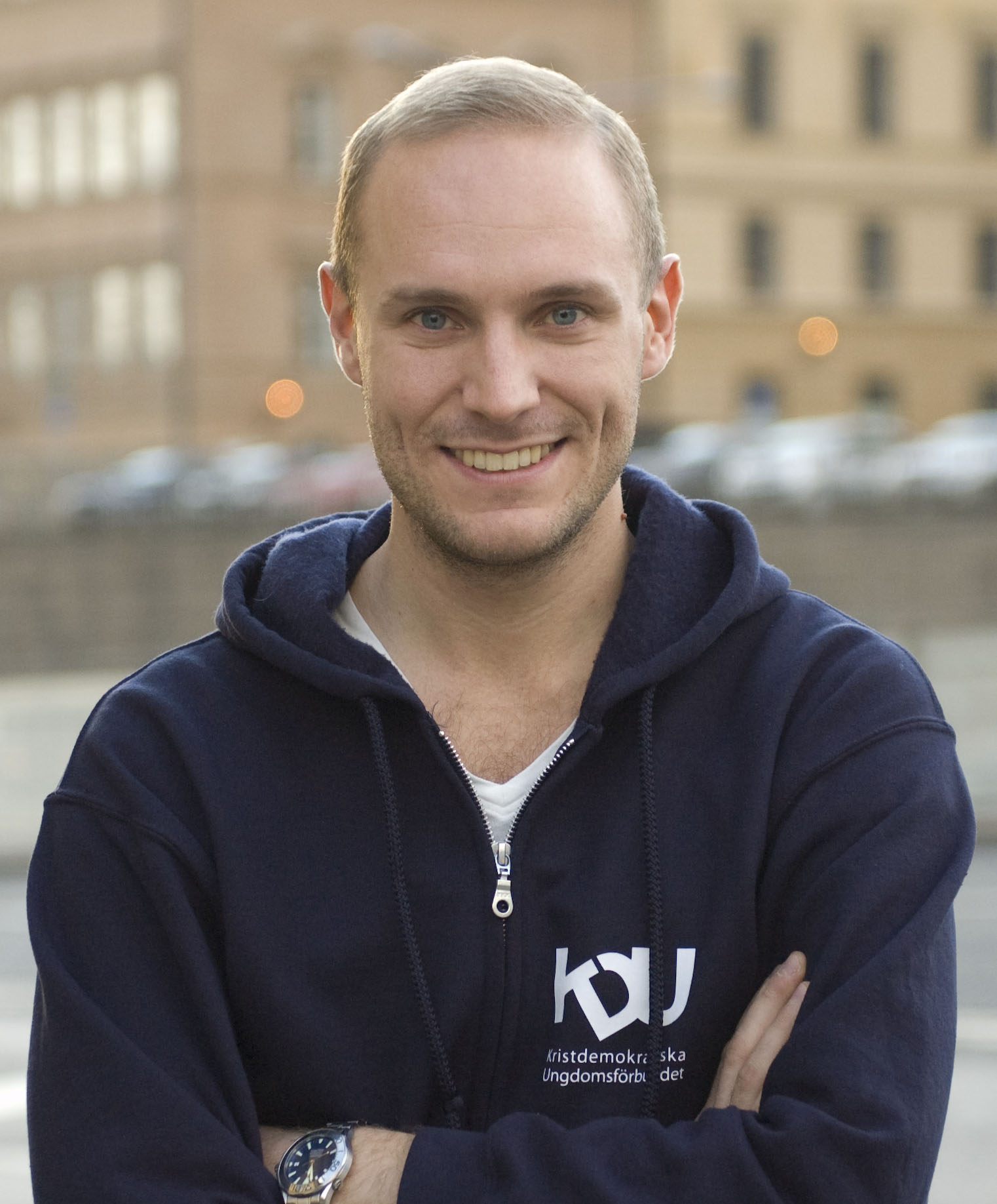 Aron Modig, förbundsordförande KDU